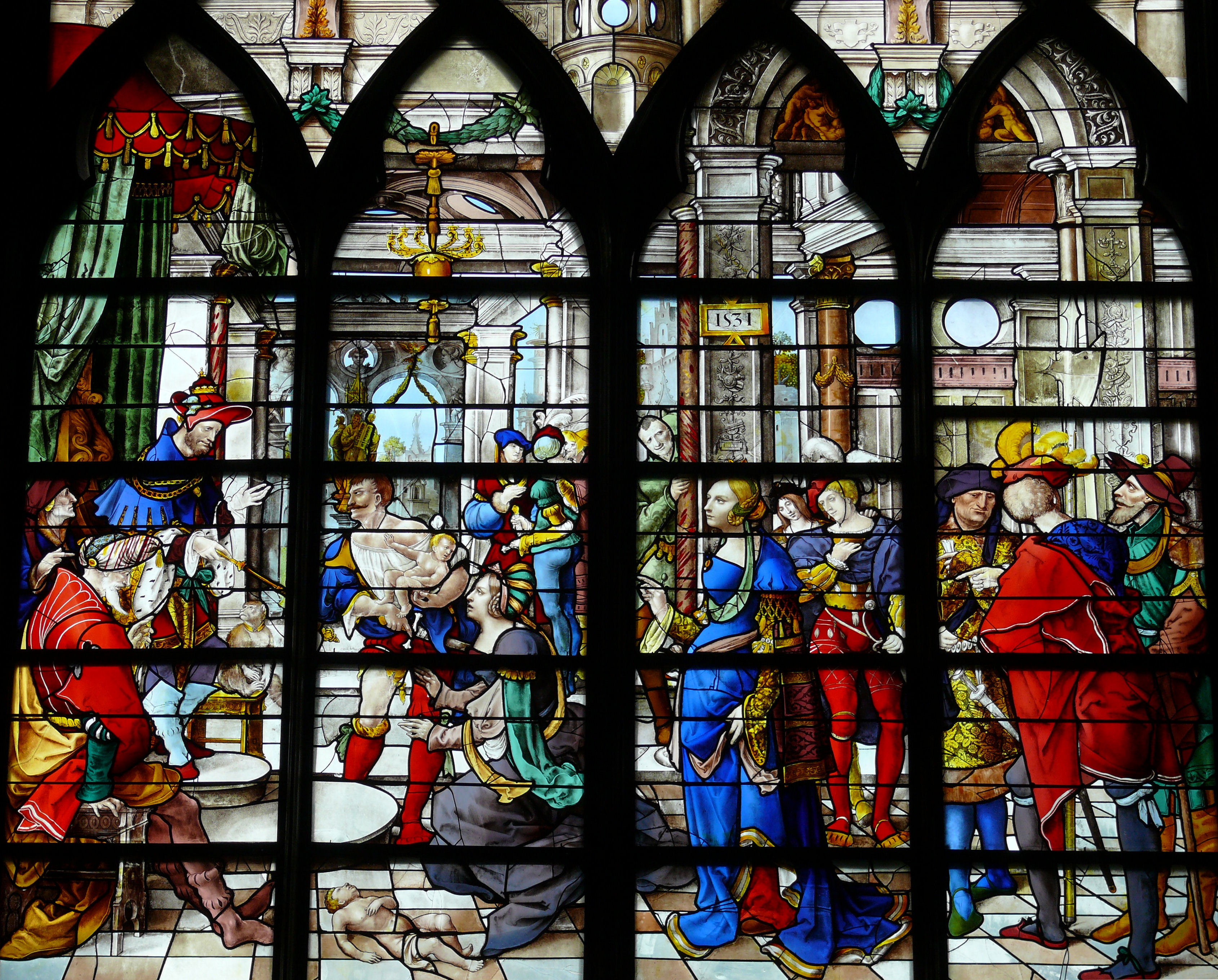 Paris - Eglise Saint-Gervais-Saint-Protais - Vitrail : Sagesse de Salomon : Jugement de Salomon